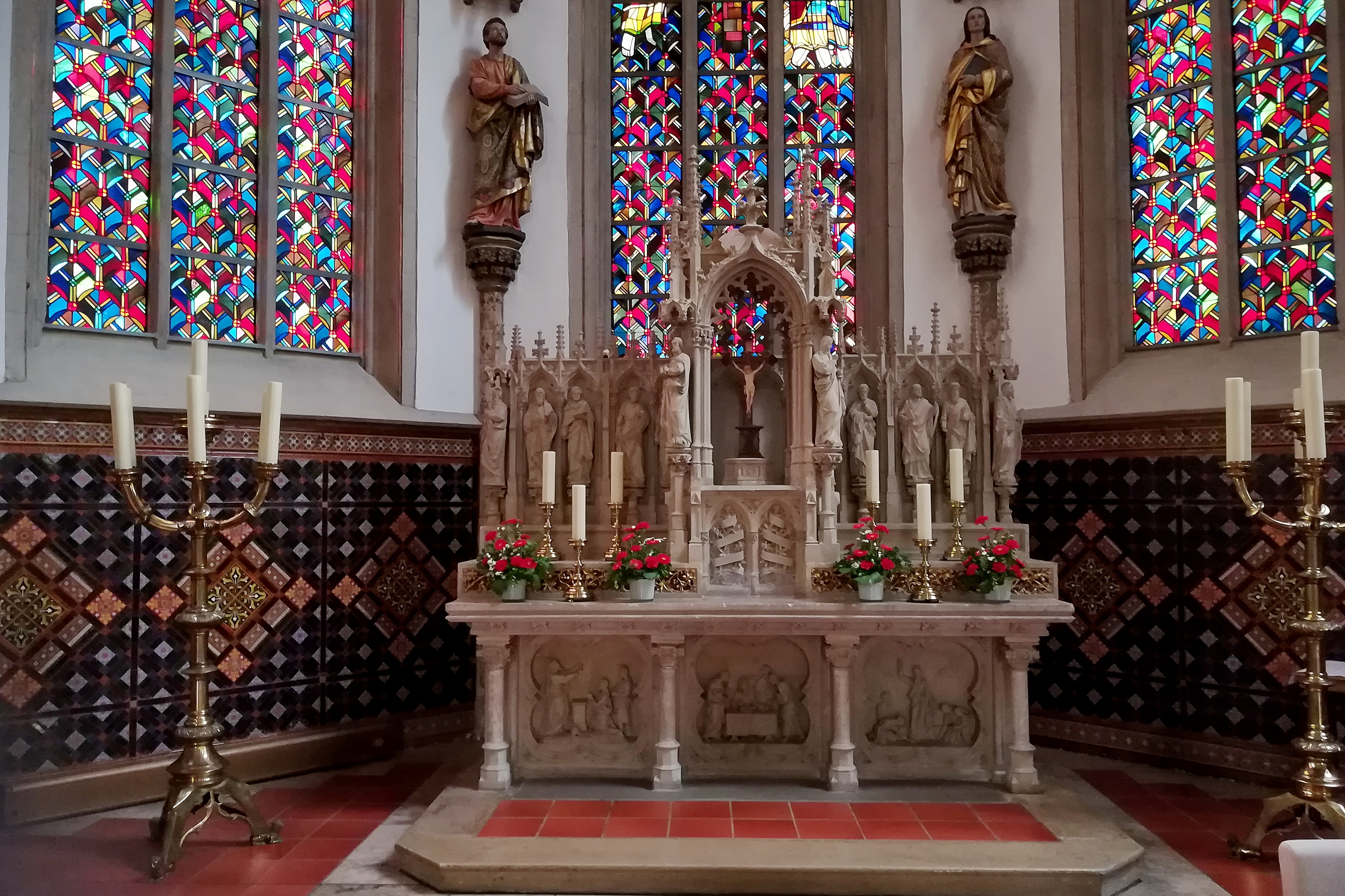 St. Felizitas ist die katholische Pfarrkirche im Zentrum der Stadt Lüdinghausen